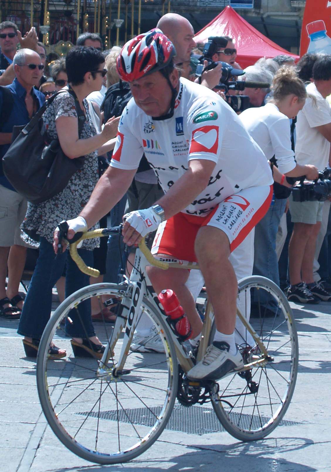 Guy Roux au premier plan et Patrick Poivre d'Arvor en arrière plan durant l'opération « On a tous un cœur » à la place de la Comédie à Montpellier en France.